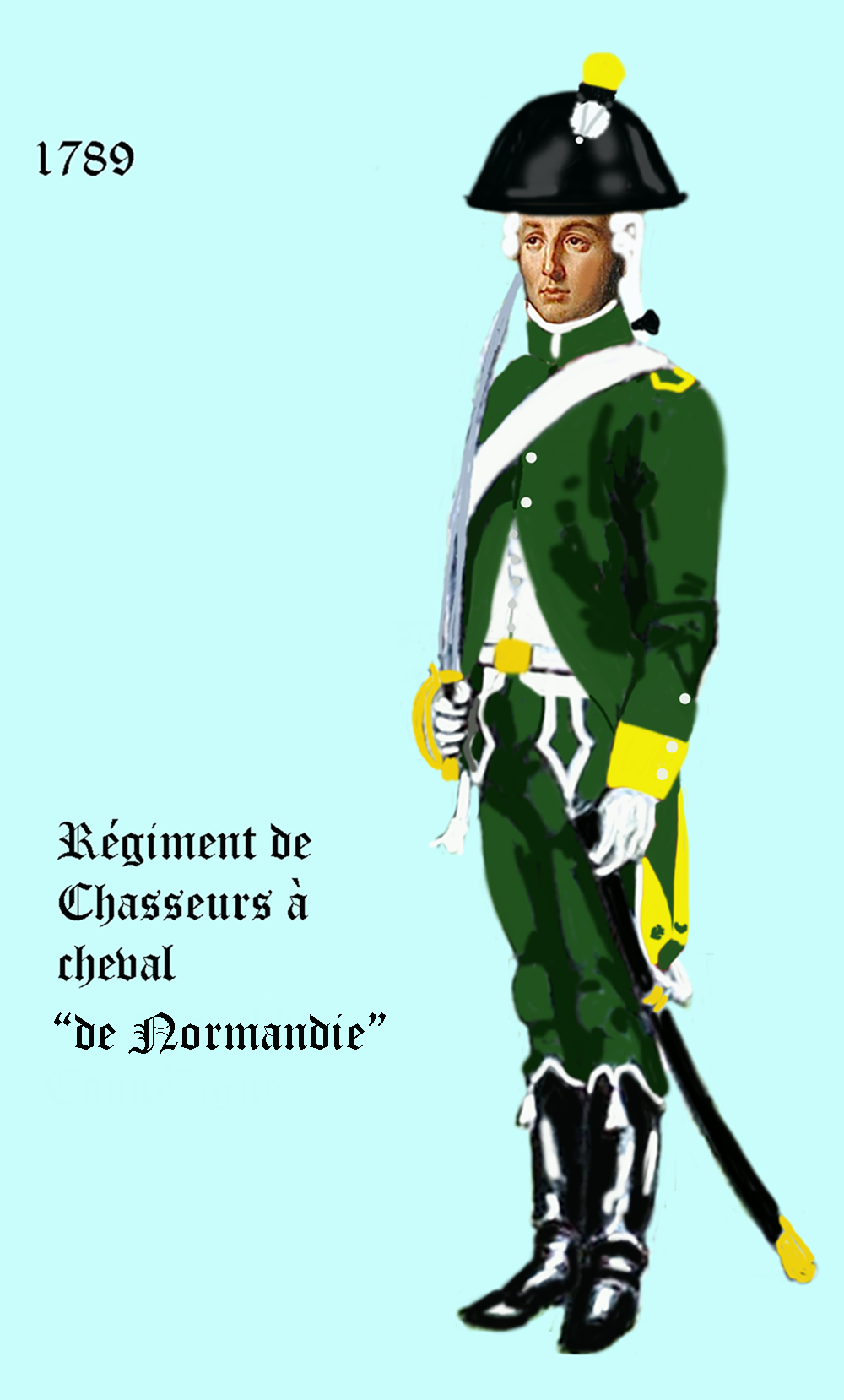 l'uniforme du régiment Chasseurs à cheval "de Normandie" de 1789